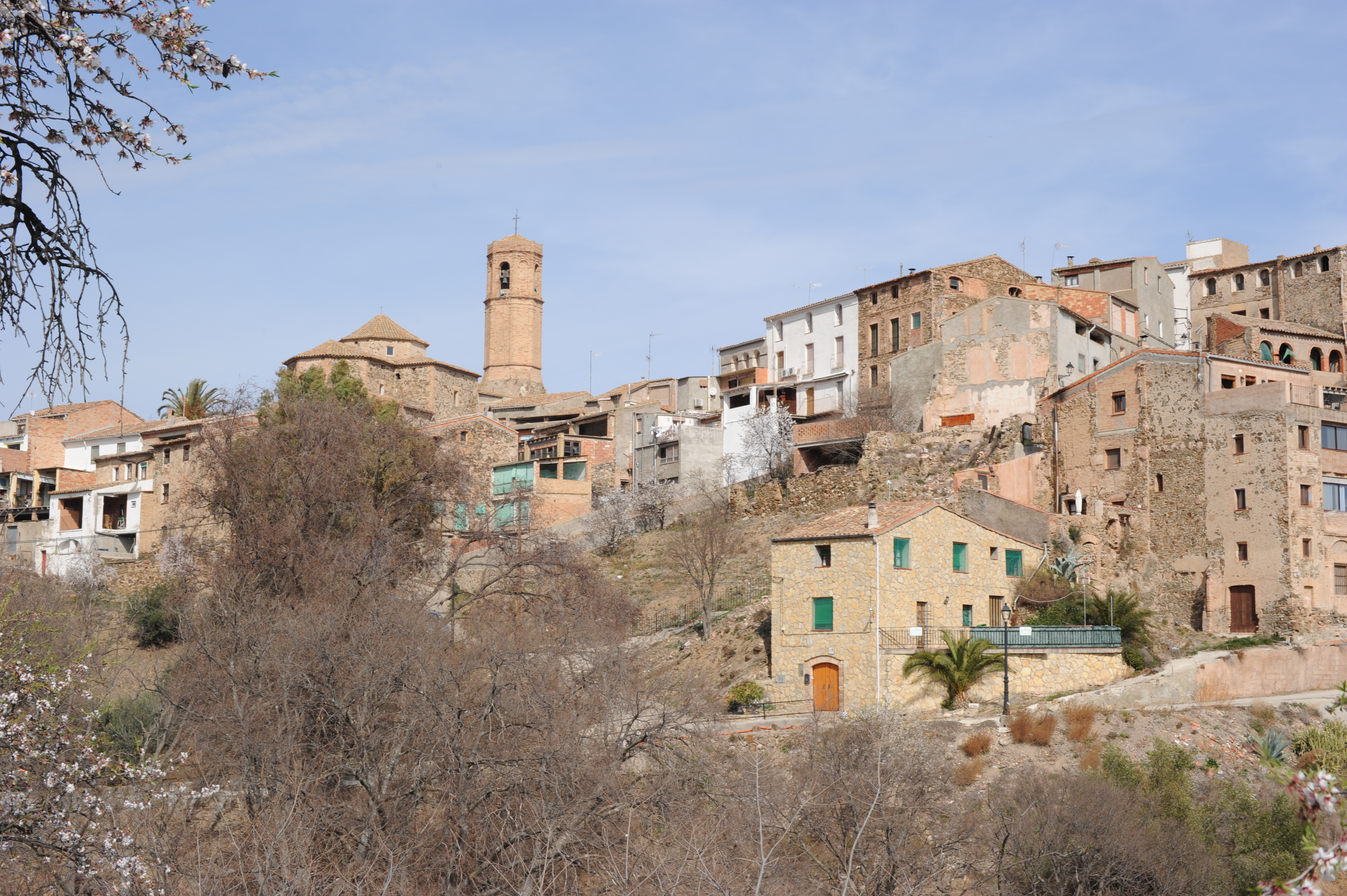 GR - 174 De Porrera a El Lloar